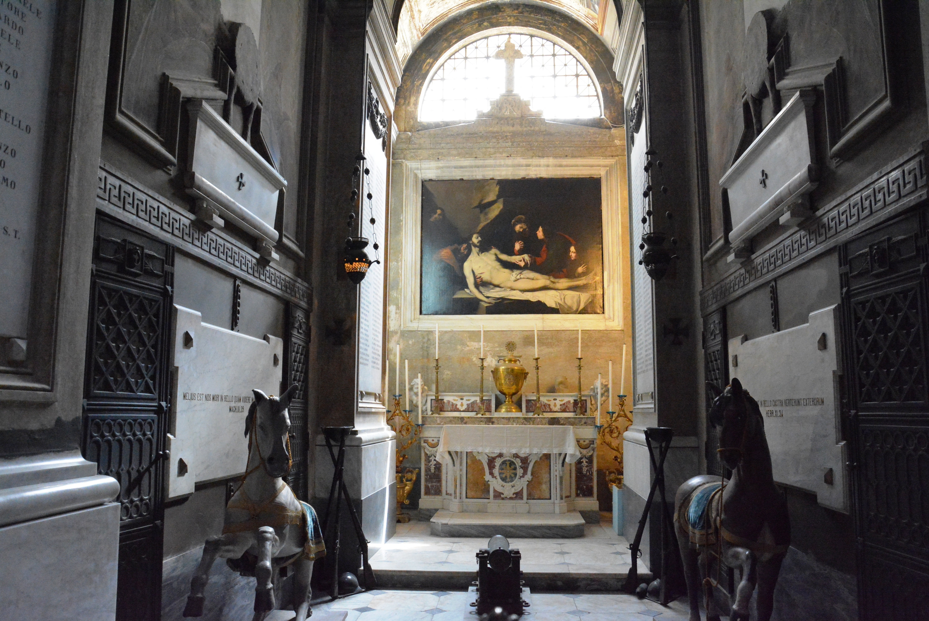 Cattedrale di Maria Santissima Assunta a Castellamma di Stabia